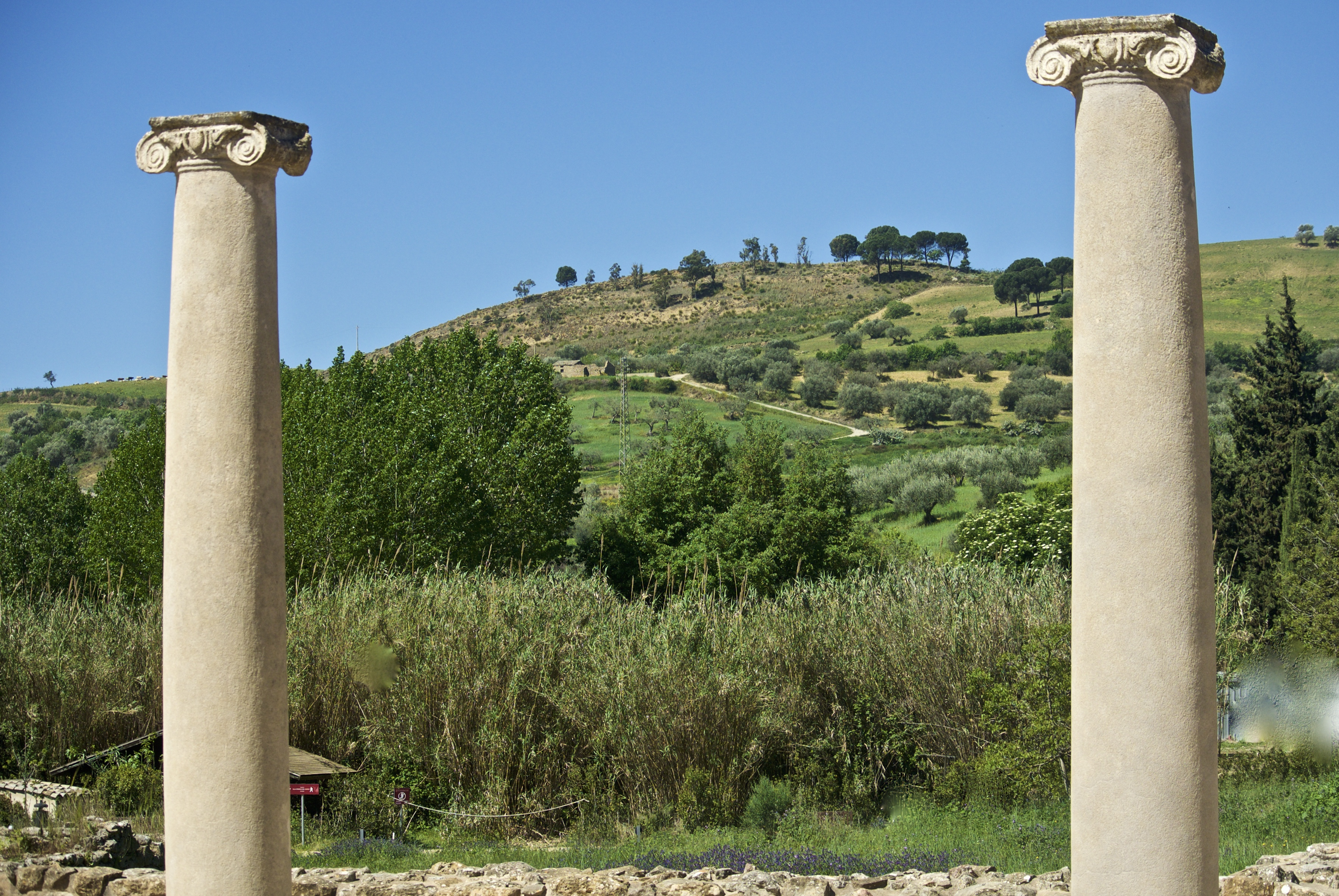 Piazza Armerina-Villa Romana del Casale-Peristyle Polygonal, colonnes ioniques à chapiteaux